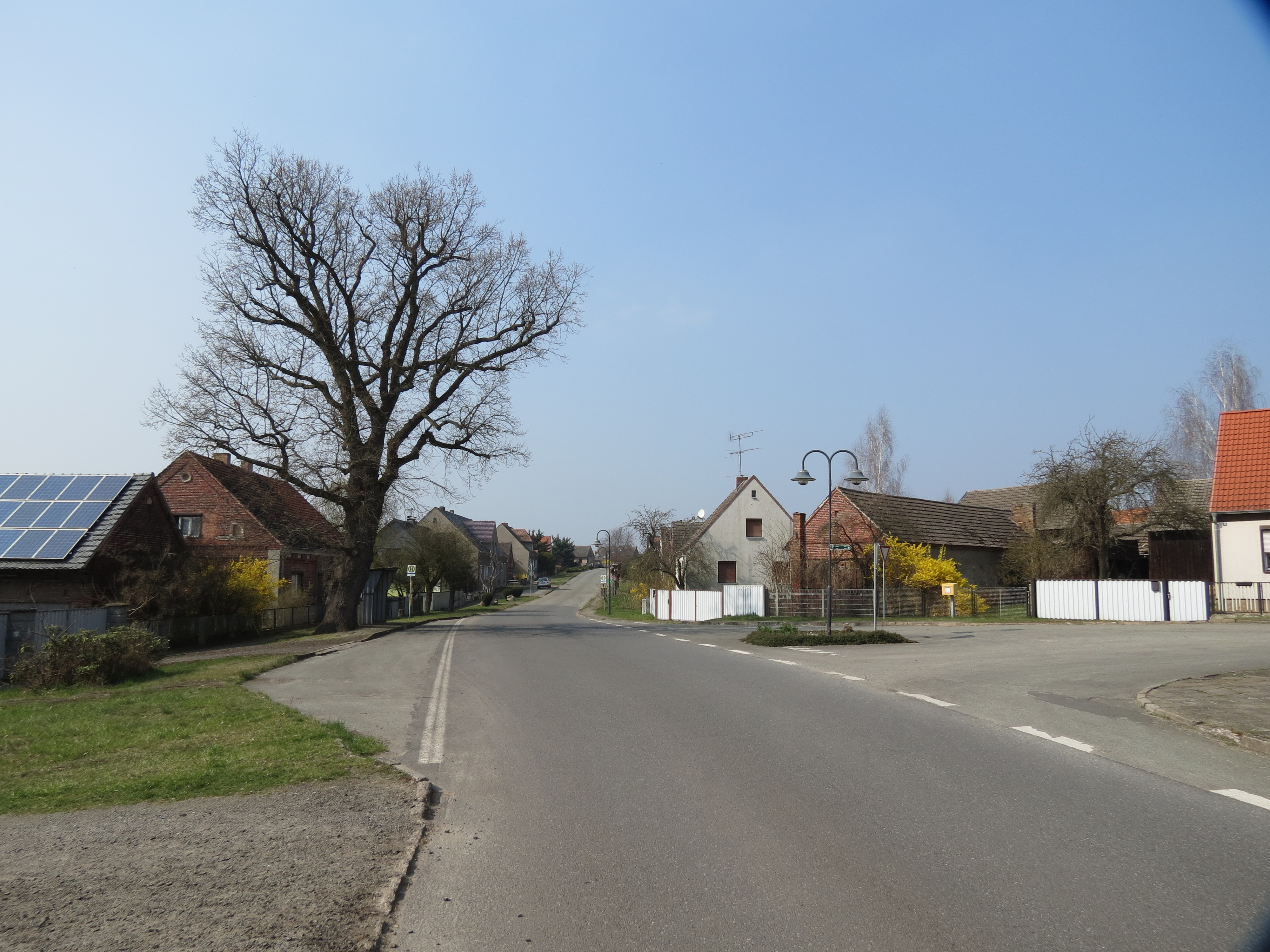 Doberburg, Ortsteil der Stadt Lieberose, Lkr. Dahme-Spreewald, Brandenburg, Deutschland, Durchgangsstraße, Blickrichtung nach Nordwesten